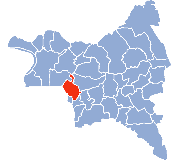 Auteur Hervé SUAUDEAU Licensing Catégorie:Cartes de Seine-saint-Denis Catégorie:Pantin